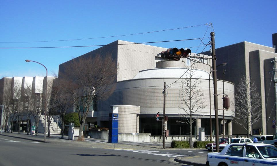 仙台市青年文化センター建物南西角。撮影場所は、公道をはさんで台原森林公園側のガードレール脇。北東方向にレンズを向けて撮影。